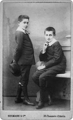 Marcel Proust et son frère Robert en 1885. Photo carte de visite par Hermann et Cie, 20 rue de la Chaussée d'Antin, Paris